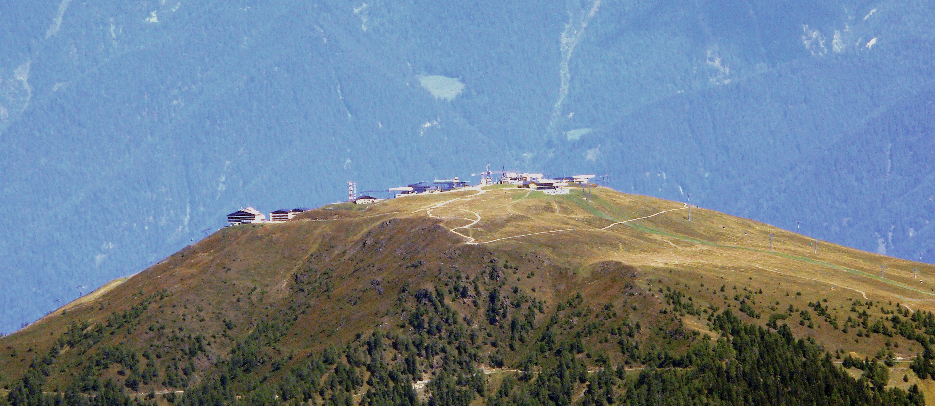 Kronplatz, Südtirol